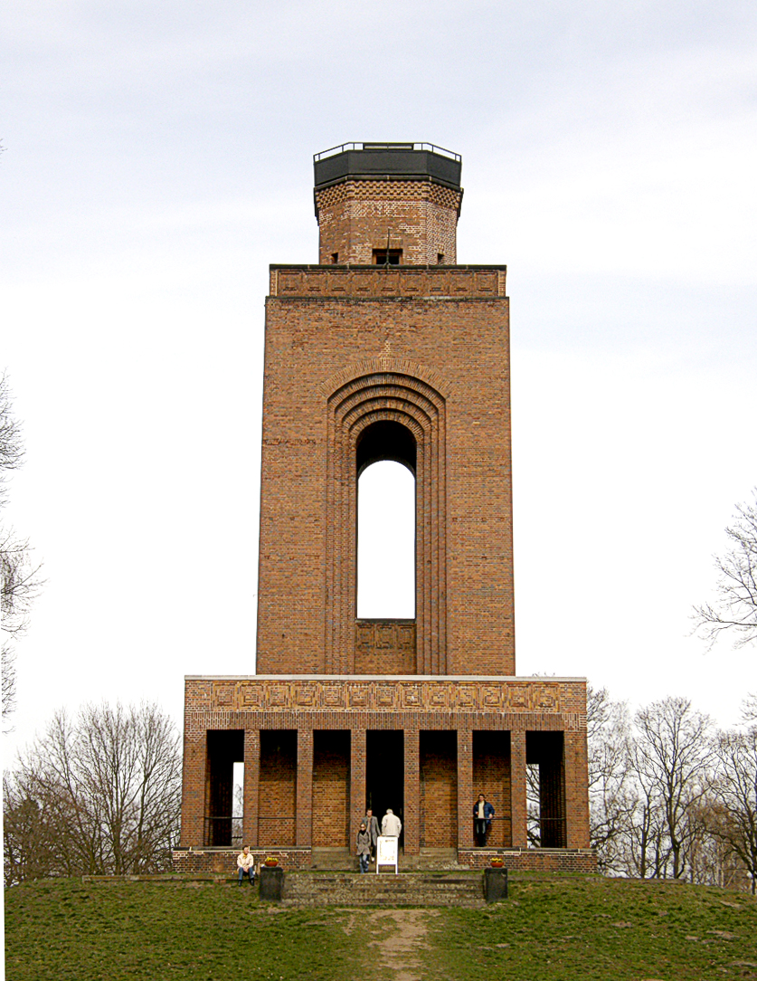 Der Bismarkturm in Burg (Spreewald)